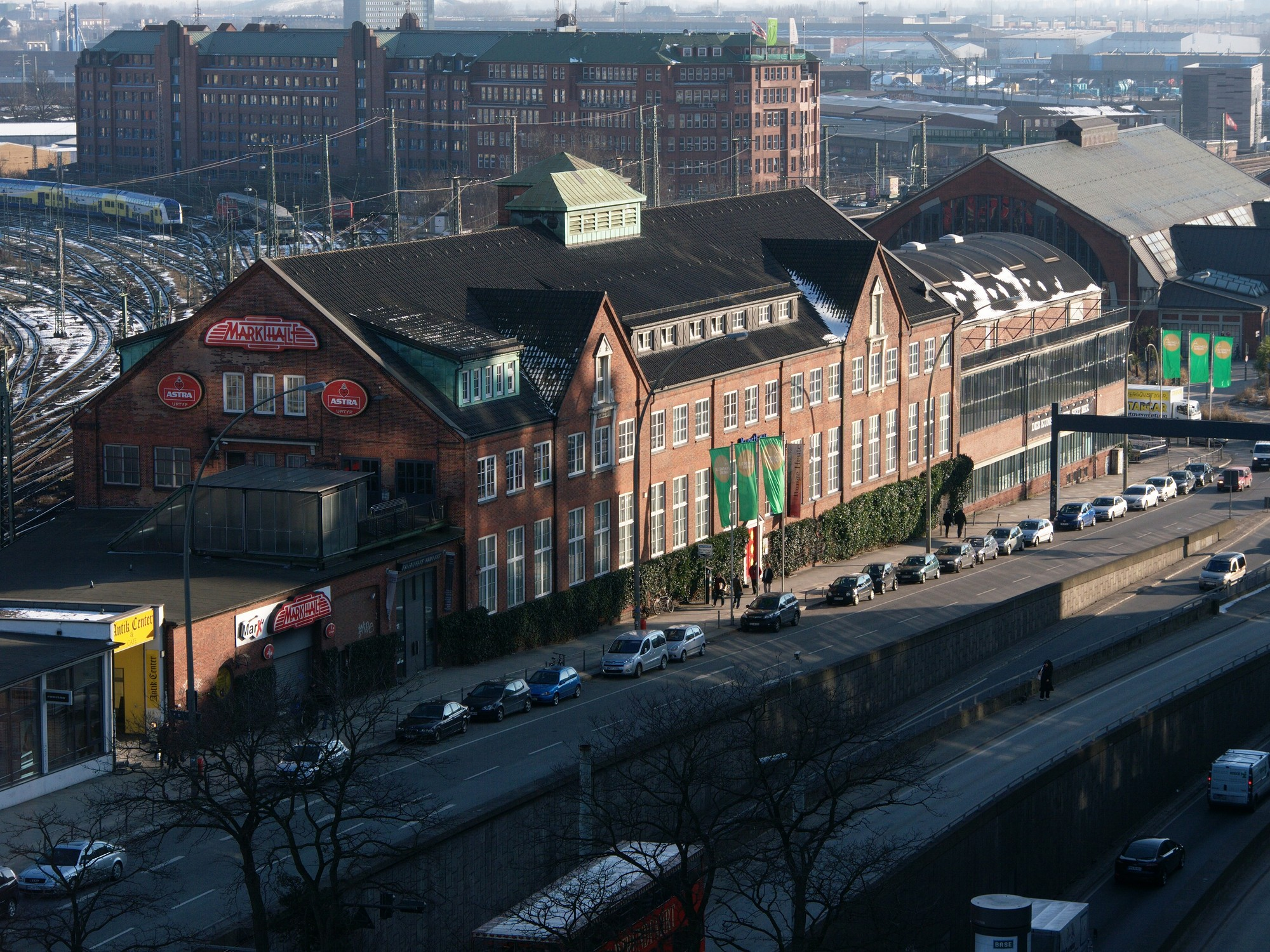 Markthalle Kunsthaus und Kunstverein in Hamburg (1911:Fritz Schumacher)